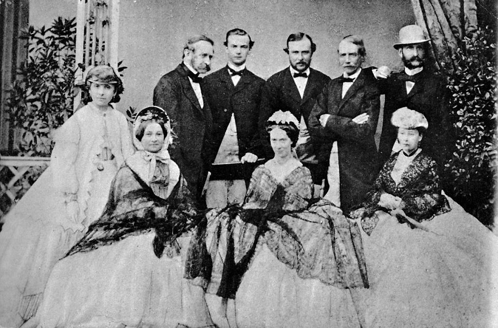 Die Fürstlich Hessische Familie auf Schloss Heiligenberg, 1864. 1. Reihe von links nach rechts: Gräfin Julie Hauke, Prinzessin von Battenberg; Prinzessin Elisabeth, Zarin Marie; Prinzessin Alice.2. Reihe von links nach rechts: Prinz Carl, Prinz Wilhelm; Prinz Ludwig; Prinz Gustav Wasa; Prinz Alexander